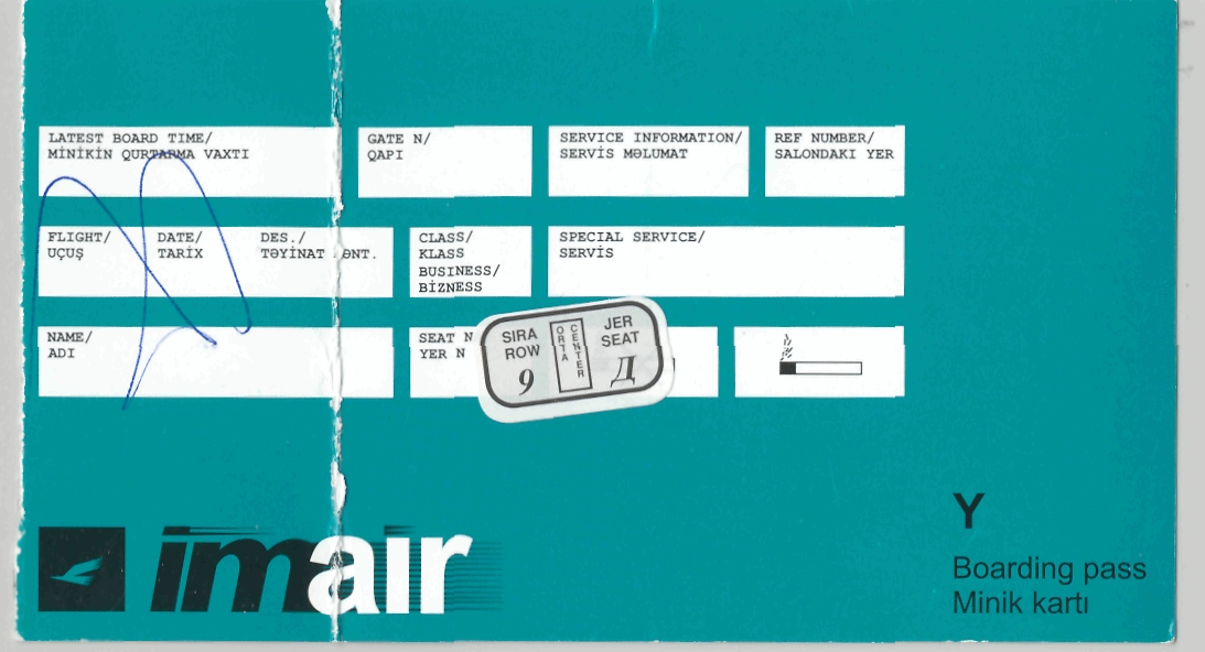 Imair Boarding Pass